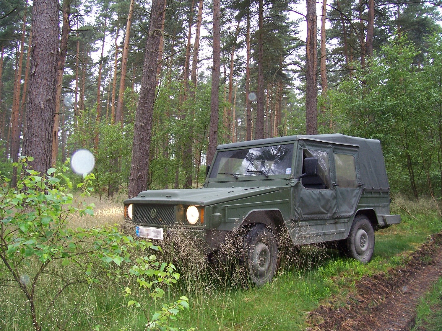 Volkswagen Iltis in einfarbiger olivgrüner Bundeswehr-Lackierung, geschlossen.